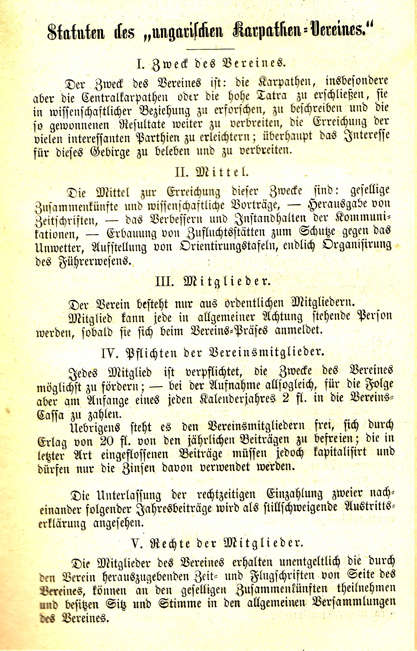 Statuten des Ungarischen-Karpathenvereins von 1873